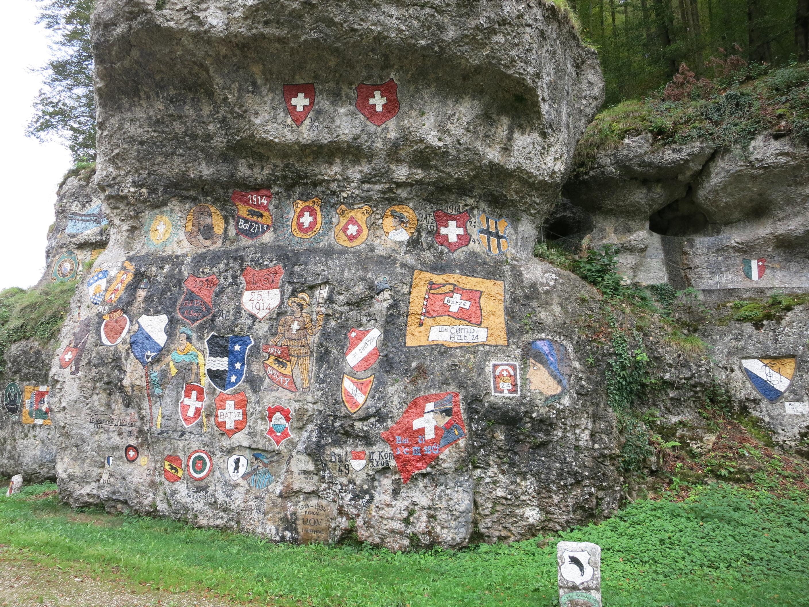 Chessiloch, Grellingen BL, Schweiz